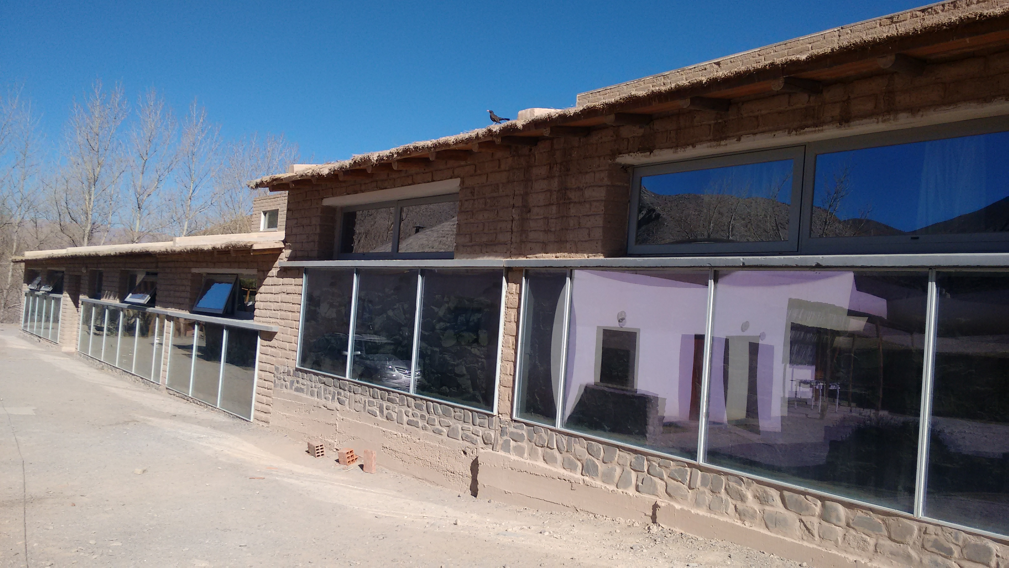 Muro trombe que capta la energía solar y mantiene el calor en temperaturas bajas a las aulas y albergues.